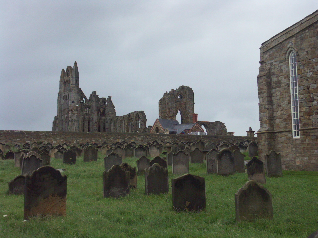 Author: Radovan Bahna, Slovak republic